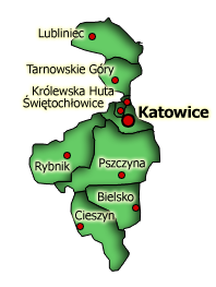 Województwo śląskie - podział na powiaty (1924-1934)